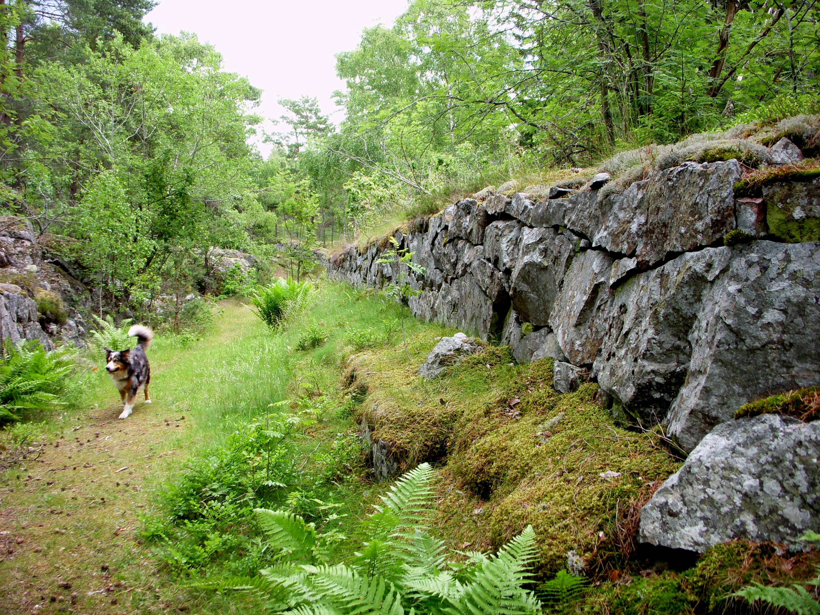 Värmdölinjen, del av en 2 km lång stenmur som förbinder batteriplatserna